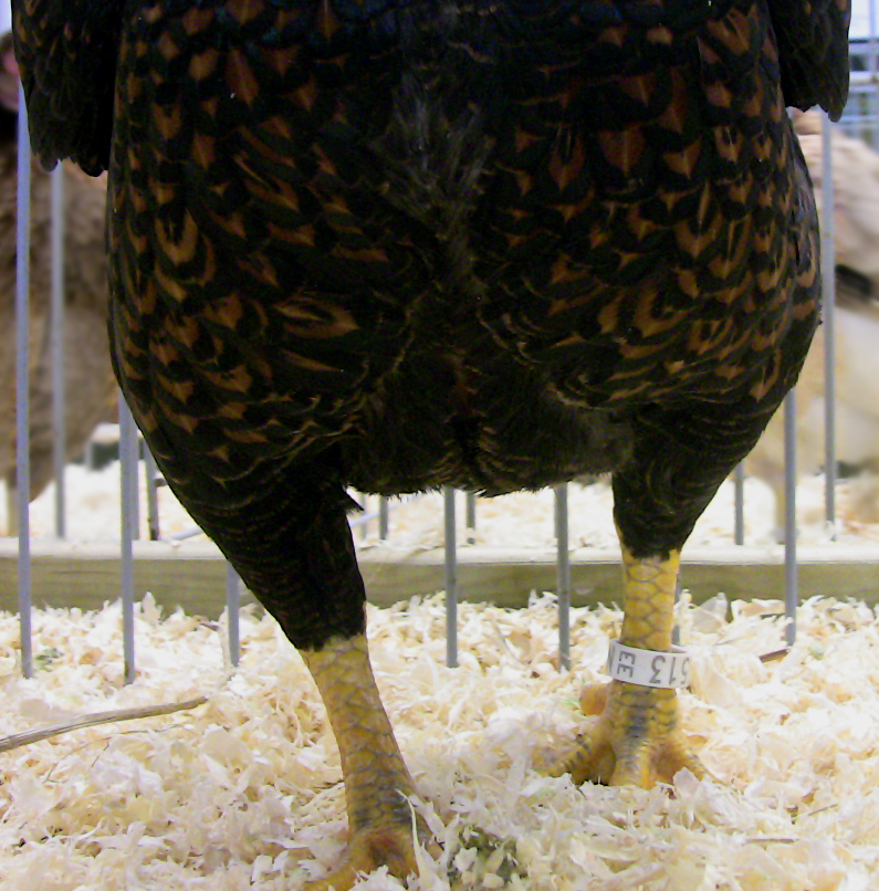 Detail eines indischen Kampfhuhnes